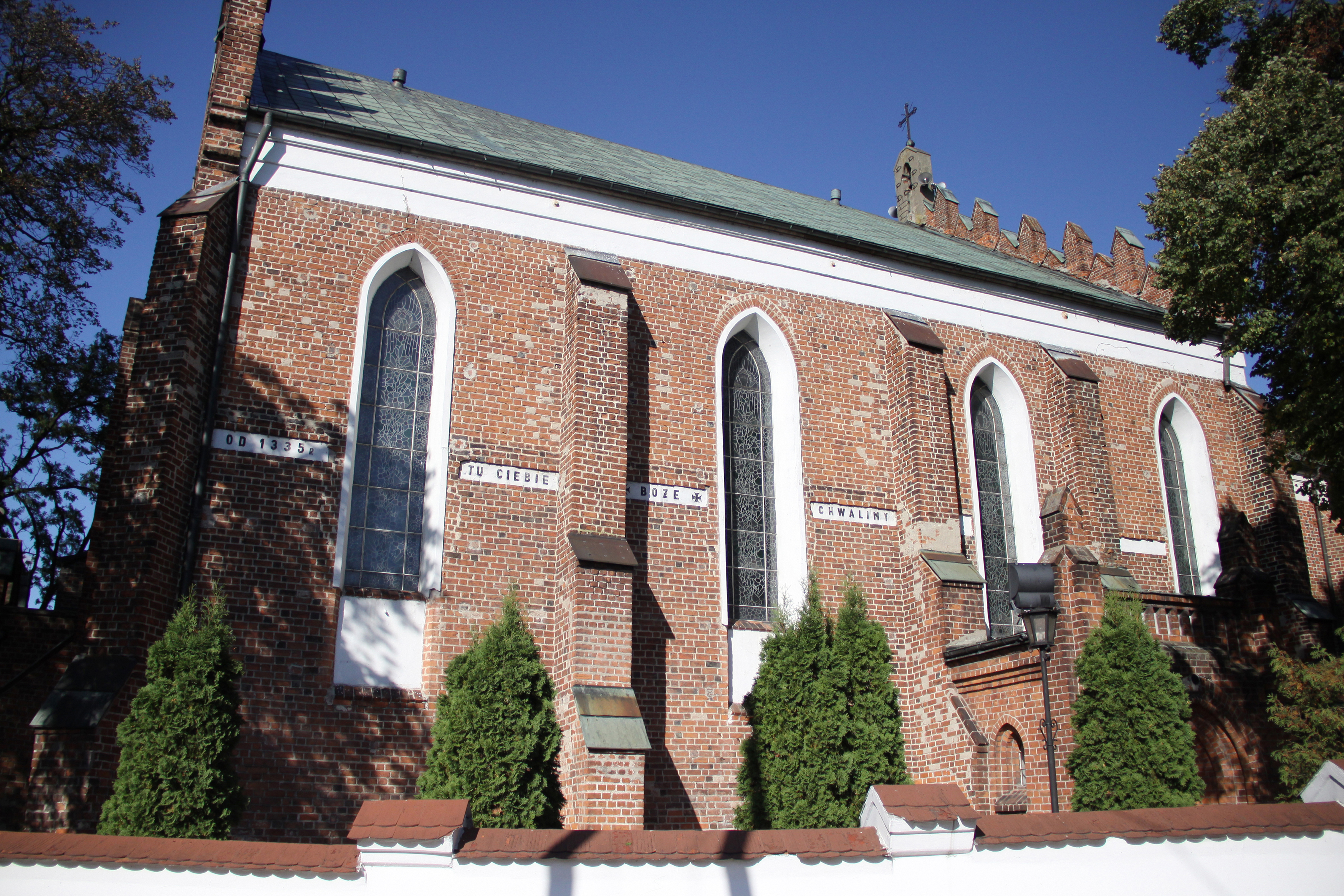 Szadek - kościół pw.Wniebowzięcia NMP (zabytek nr 850 z 28.12.1967)